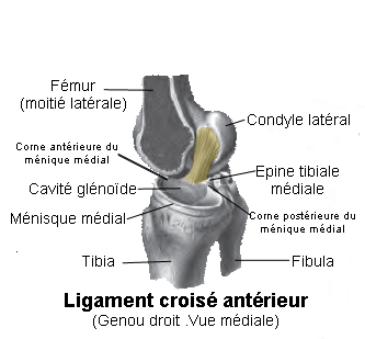 Ligament croisé antérieur.Anatomie humaine